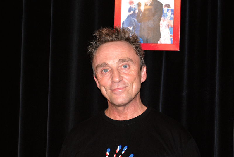 Mark Britton im Kom(m)ödchen Düsseldorf